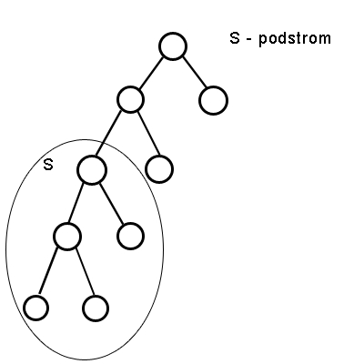 Sous-arbre dans un arbre